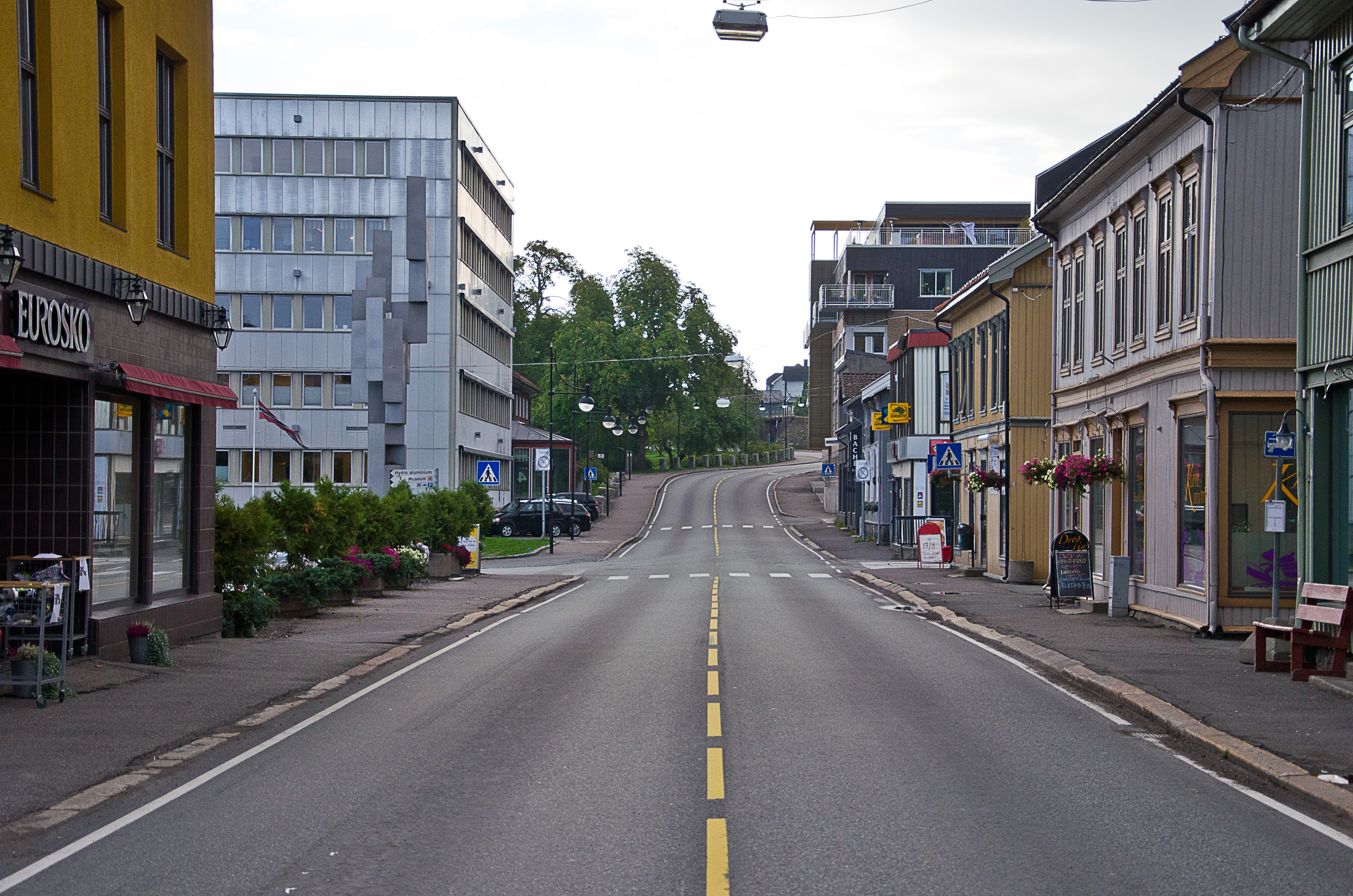 Fylkesvei 900 Langgaten i Holmestrand, Vestfold